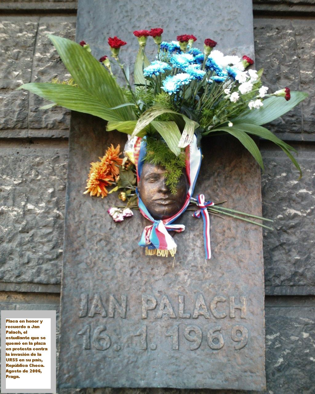 Placa conmemorativa del estudiante Jan Palach.